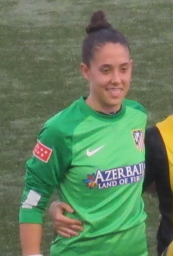 Atletico de Madrid Feminas